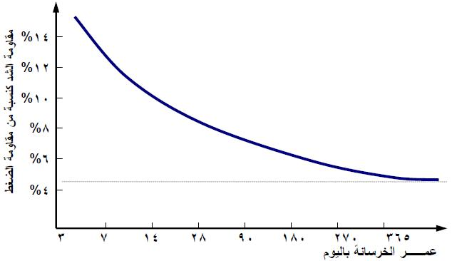 مقاومة شد الخرسانة مع العمر